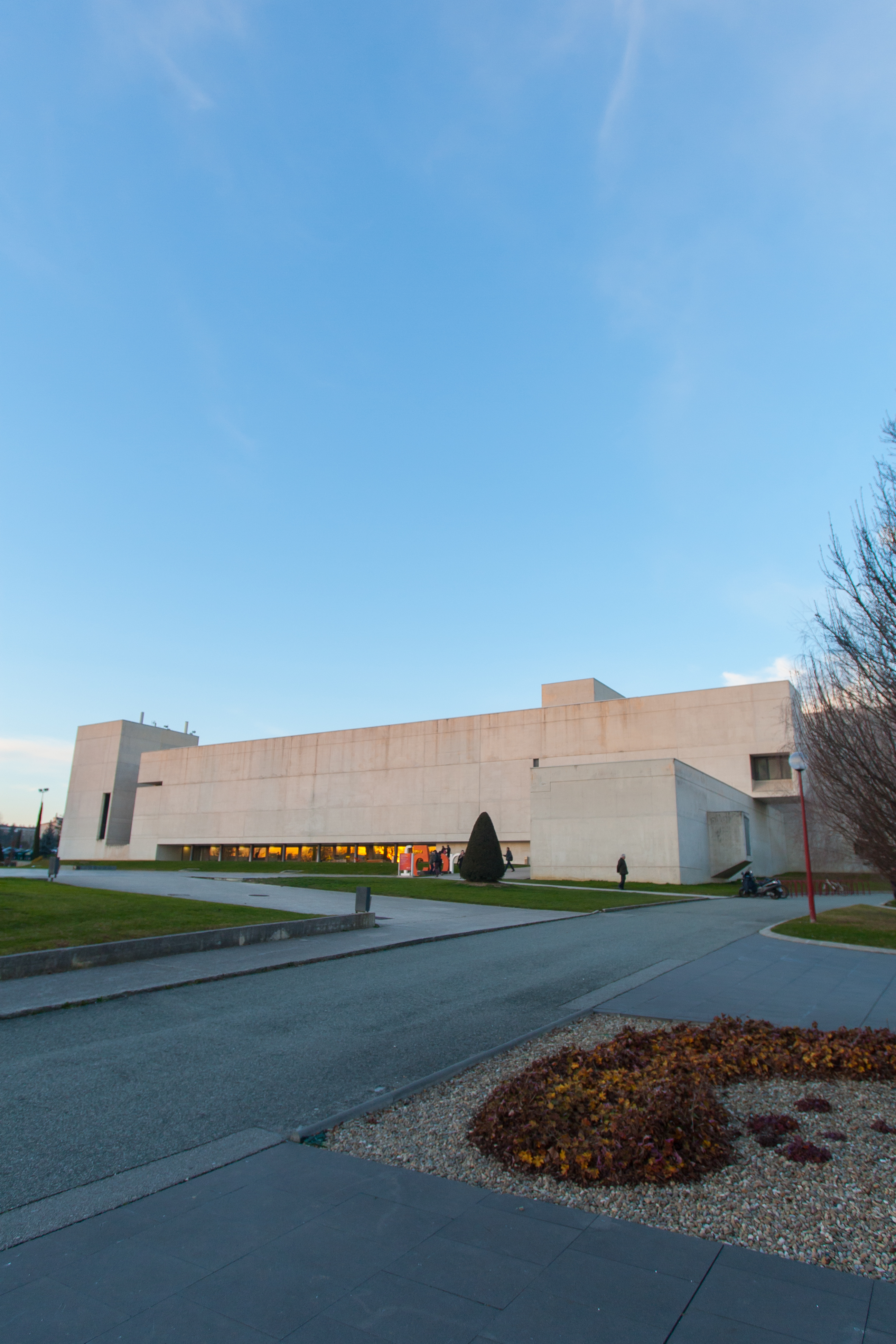 Edificio Fcom (Universidad de Navarra)